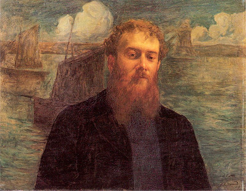 Portrait de Charles Cottet (1863-1925)